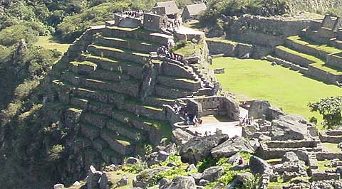 Al fondo, colina del intihuatana. En primer plano, la "plaza sagrada" con el Templo Principal. Machu Picchu, Perú.